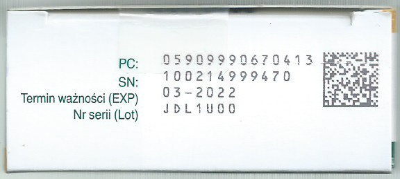 Oznaczenie opakowania leku zgodne z EMVO. Podano ProductCode, SerialNumber, ExpDate, LotNumber i kod dwuwymiarowy DataMatrix